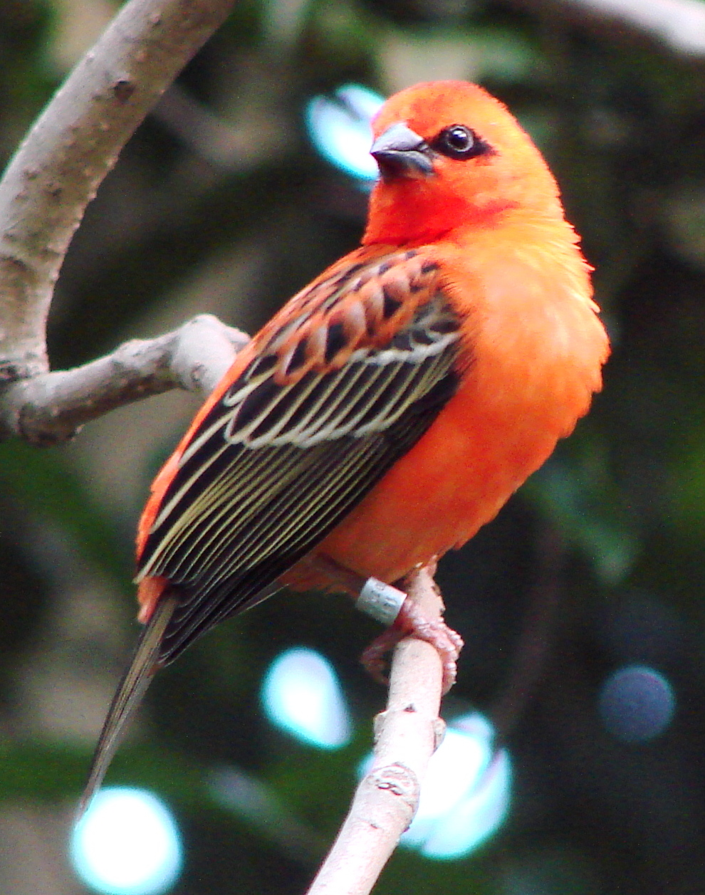 Foudi rouge (Foudia madagascariensis)